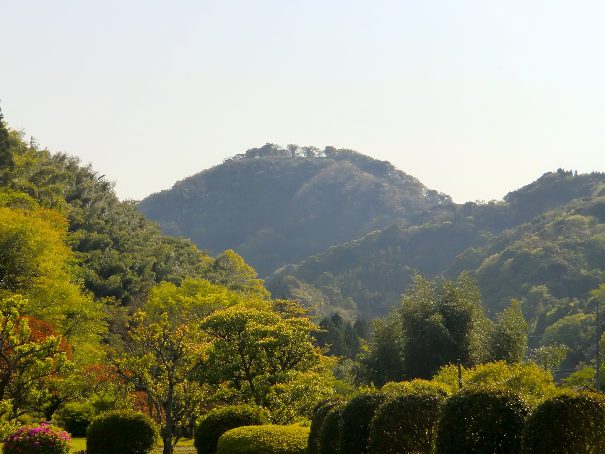 石見国山吹城の遠景（島根県大田市・要害山）。